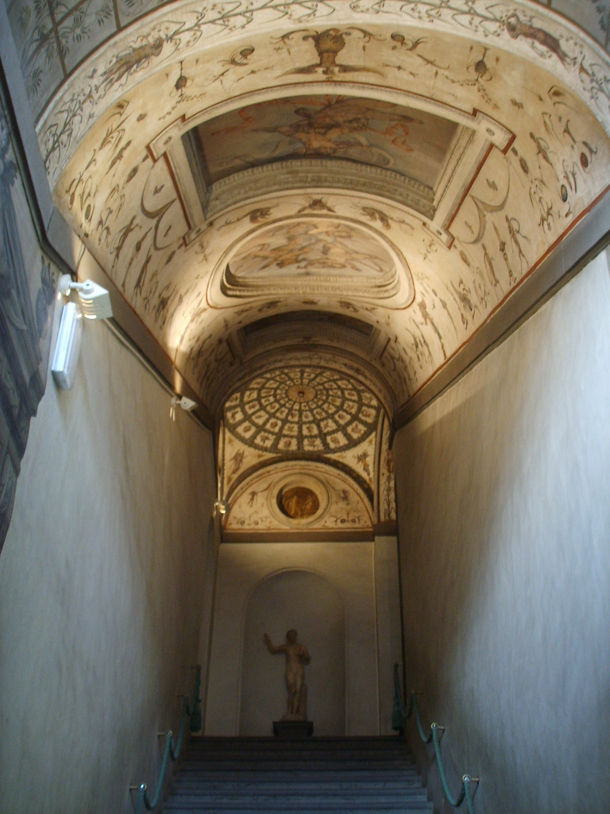 Scala con volta affrescata by Marco da Faenza